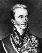 Franz Anton von Kolowrat-Liebsteinsky